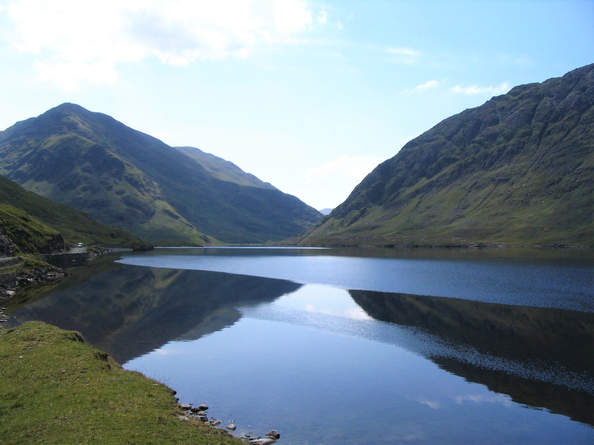 DooLough_Pass_Road_-_BenCreggan_-_Delphi_Pass- Comté de Mayo Ireland